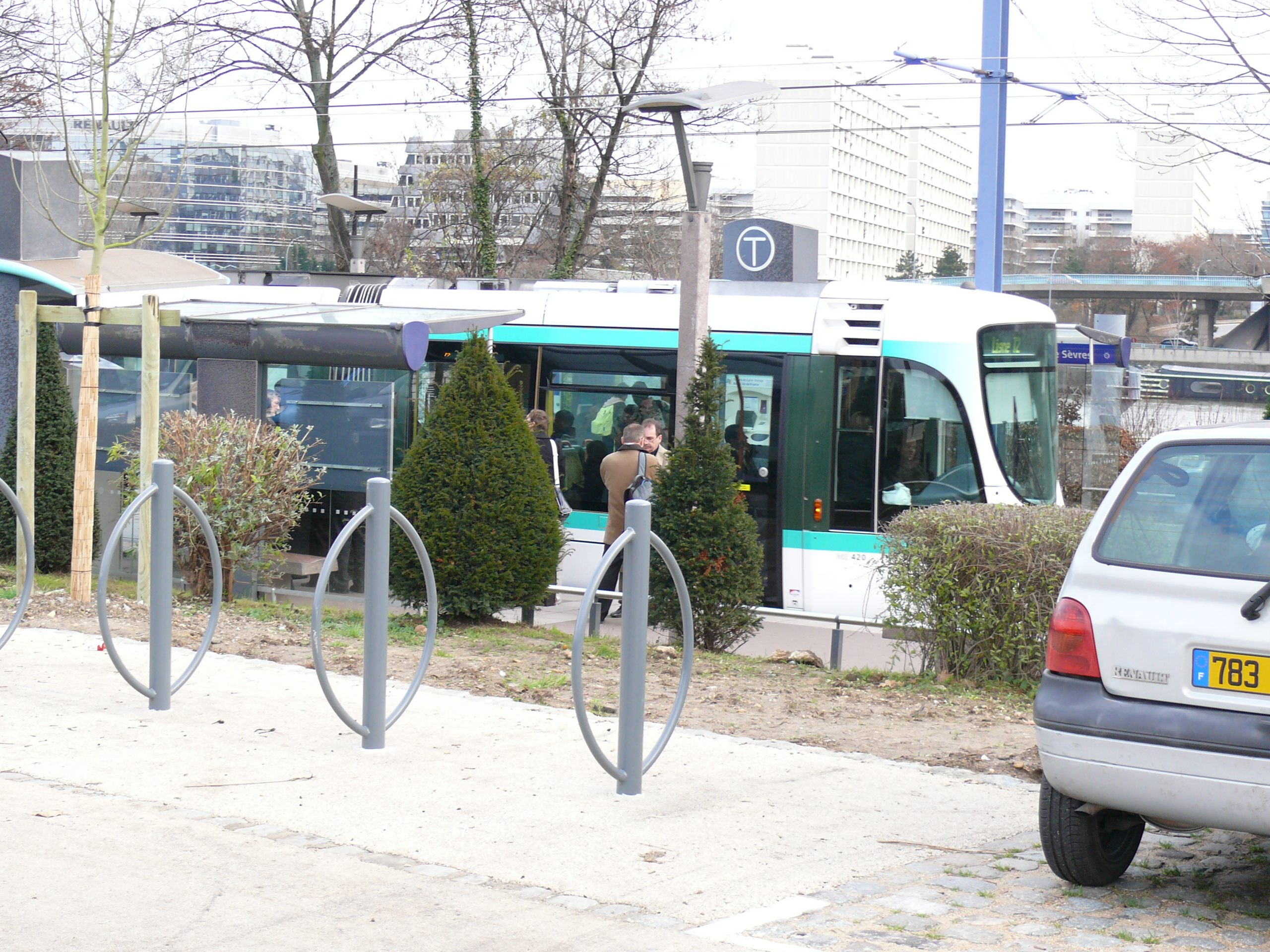 Intermodalité à la station Musée de Sèvres de la Ligne 2 du tramway d'Île-de-France